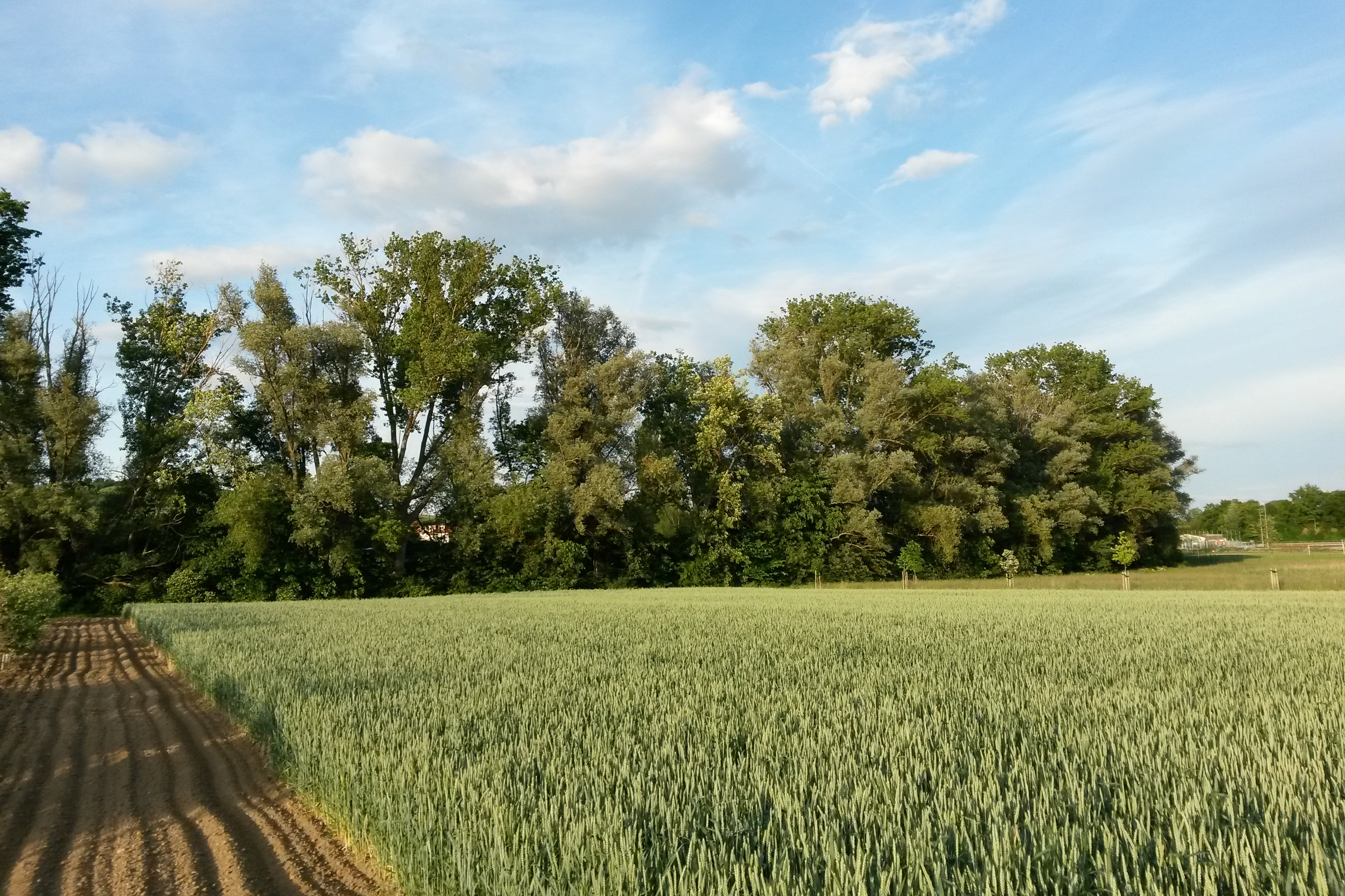 Naturschutzgebiet „Am Totenweg“ im Landkreis Mainz-Bingen (Stadecken-Elsheim, Engelstadt): Schutzzweck ist die Erhaltung und Entwicklung eines ökologisch wertvollen Bereichs der Selzniederung mit naturnahem Bachlauf und Graben, Gehölzbeständen, Schilfröhricht sowie grundfeuchten Grünland-, Ackerflächen und Buschobstkulturen als Standorte typischer und seltener wildwachsender Pflanzenarten, Lebensstätte, Rast-, Überwinterungs- und Trittsteinbiotope für typische und seltene, in ihrem Bestand bedrohte Tierarten sowie entsprechenden Lebensgemeinschaften im Gesamtverband eines den Einzugsbereich der Selz umfassenden vernetzten Biotopsstems.